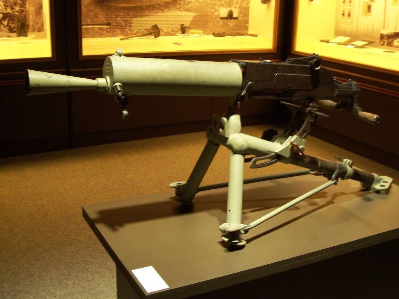 Ciężki karabin maszynowy Schwarzlose MG M 07/12